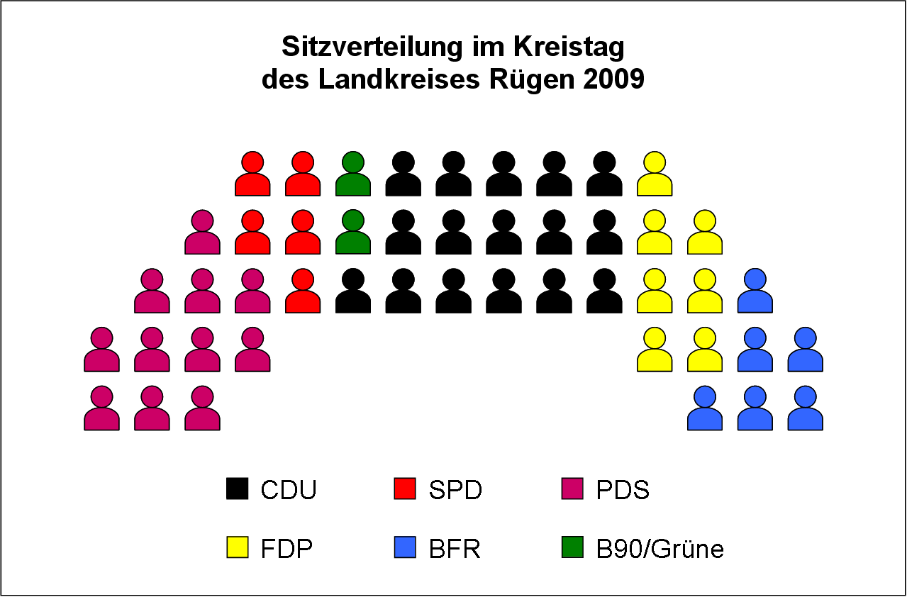 Sitzverteilung Kreistag Rügen 2005